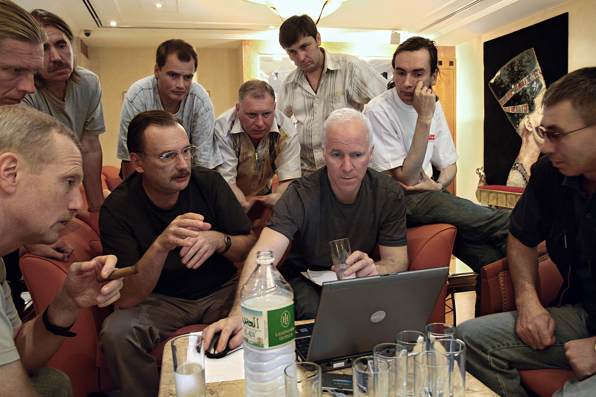 Эдвард Опп (за компьютером), во время Фотосеминара ИД "Коммерсантъ", Дубай, ОАЭ